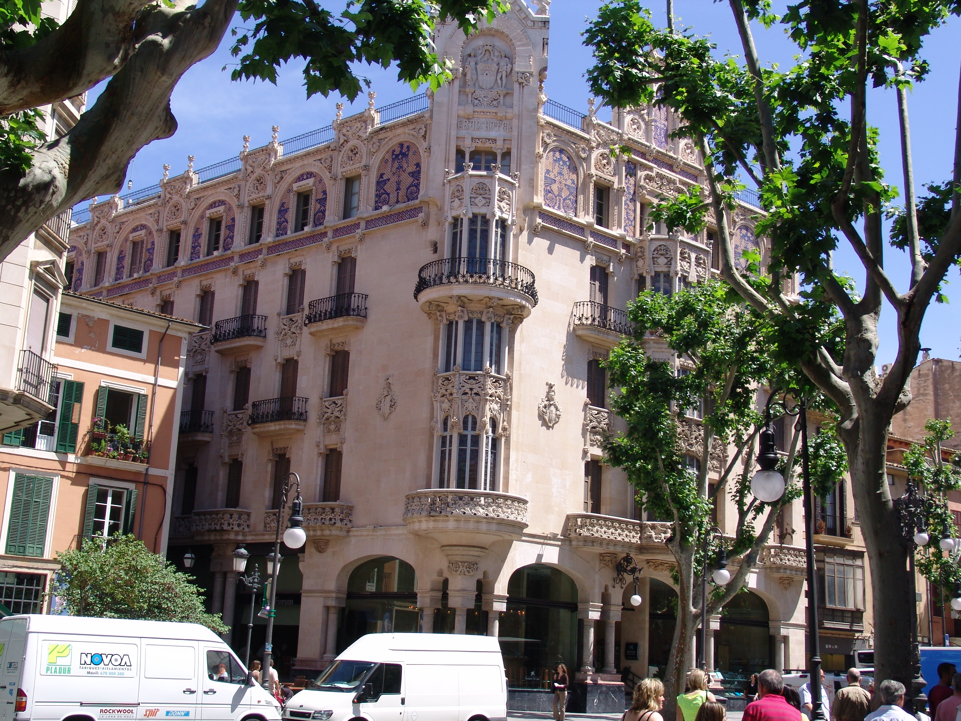 Häuser in Palma de Mallorca